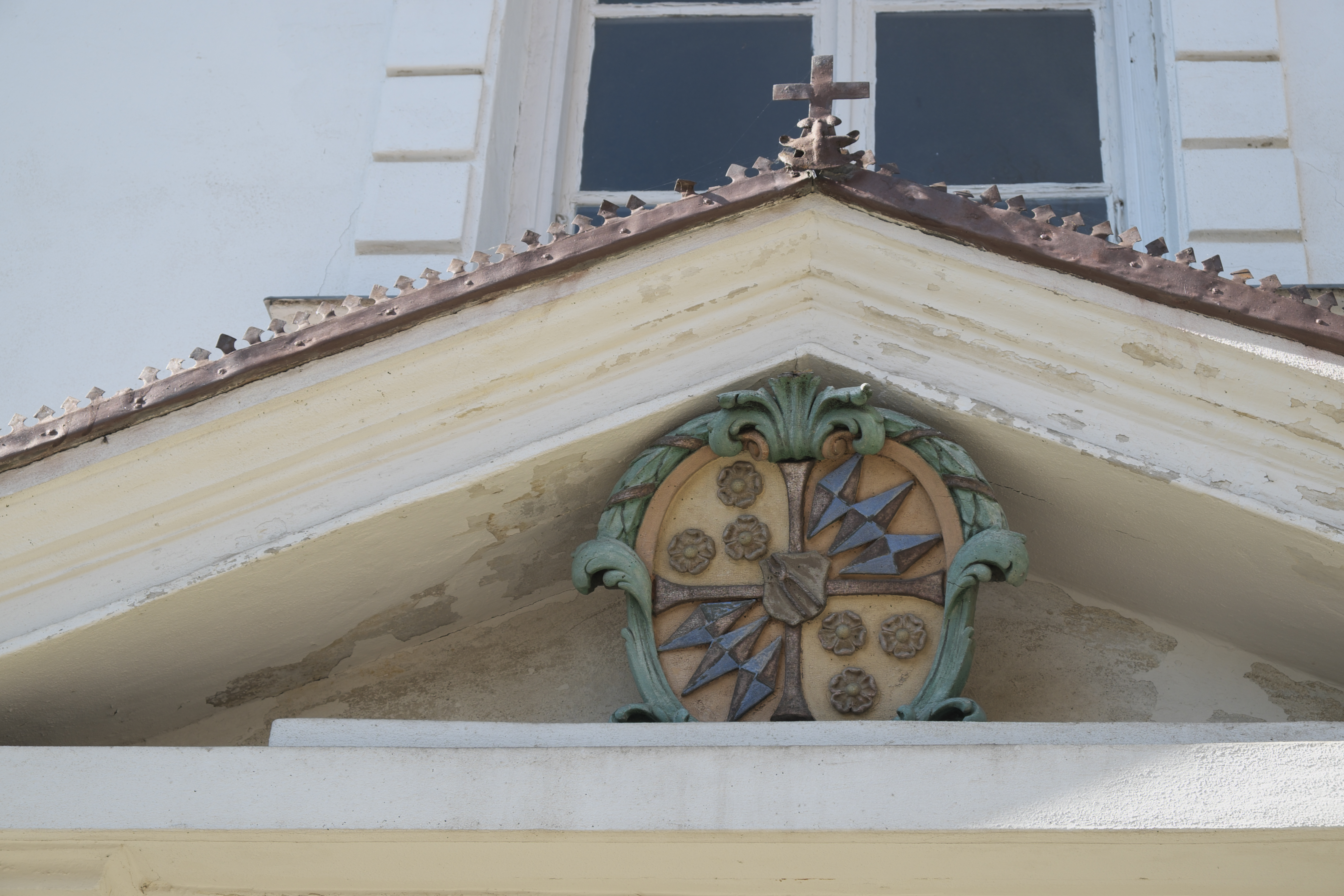 Amtshaus in Tengling (Taching am See) im Landkreis Traunstein (Bayern/Deutschland)